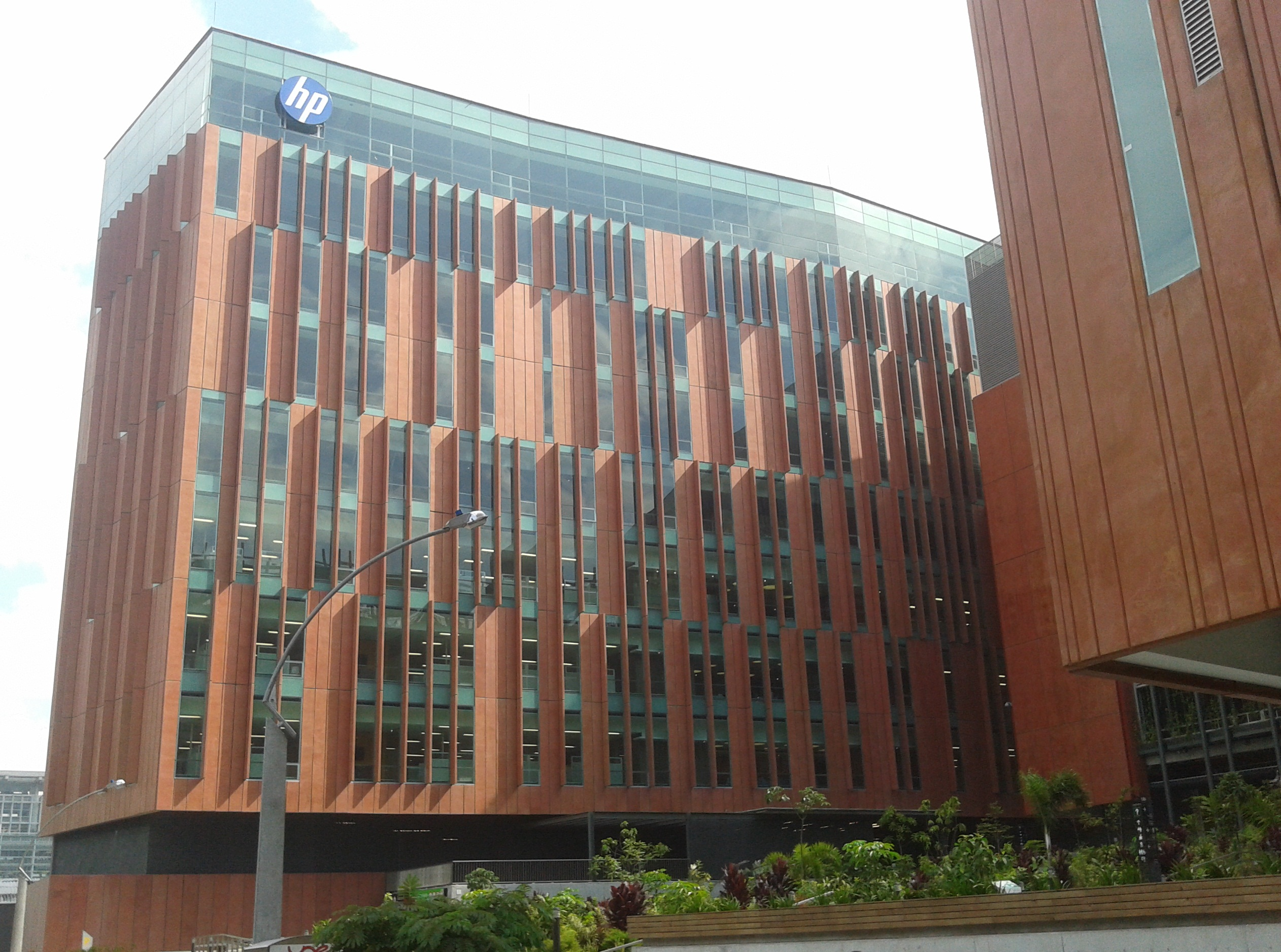 Edificio Hewlett Packard, Ruta n, Medellín